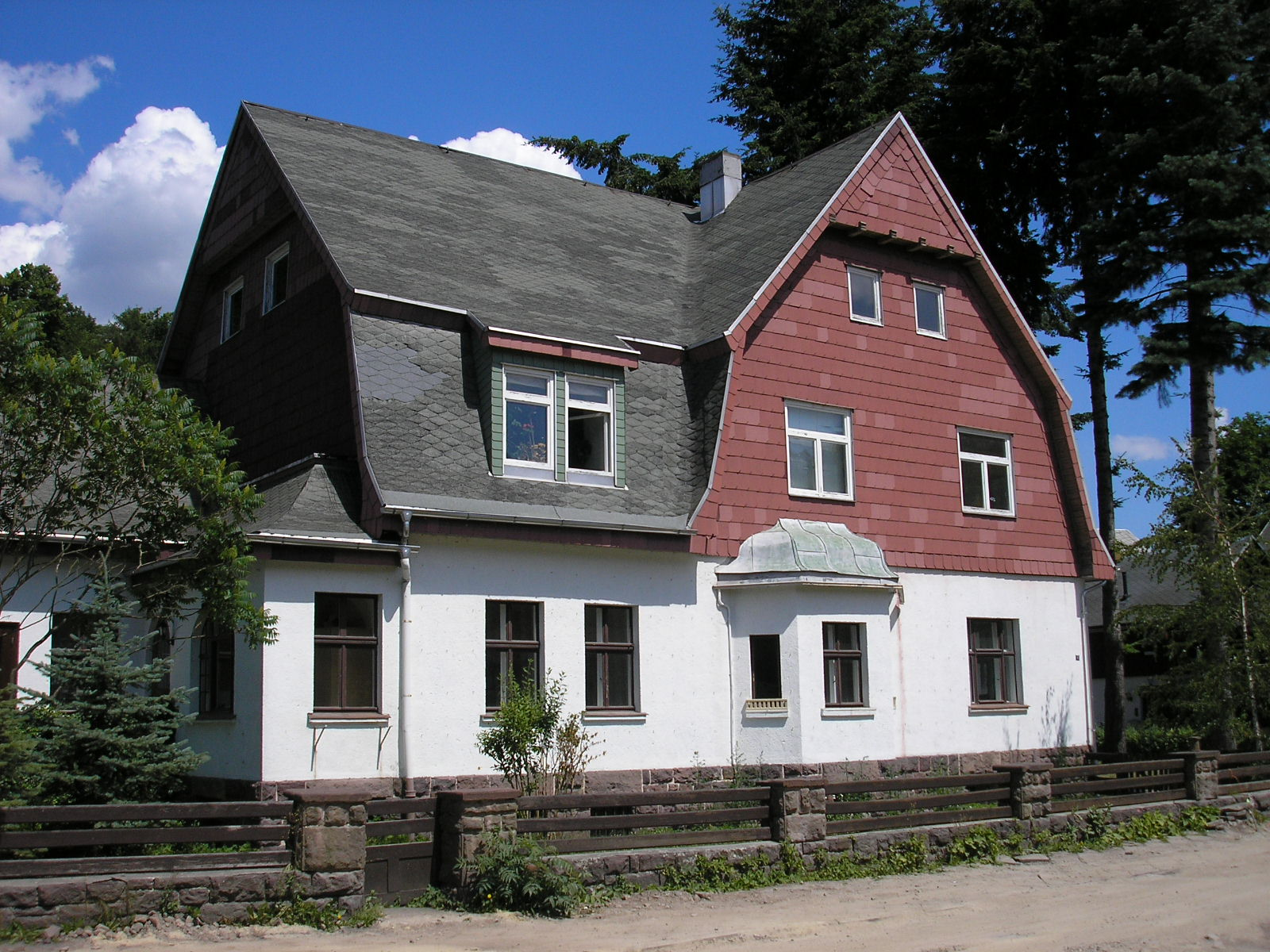 Das Forsthaus von Ilmenau (Thüringen).